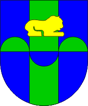 Wappen von Trebnje Slowenien